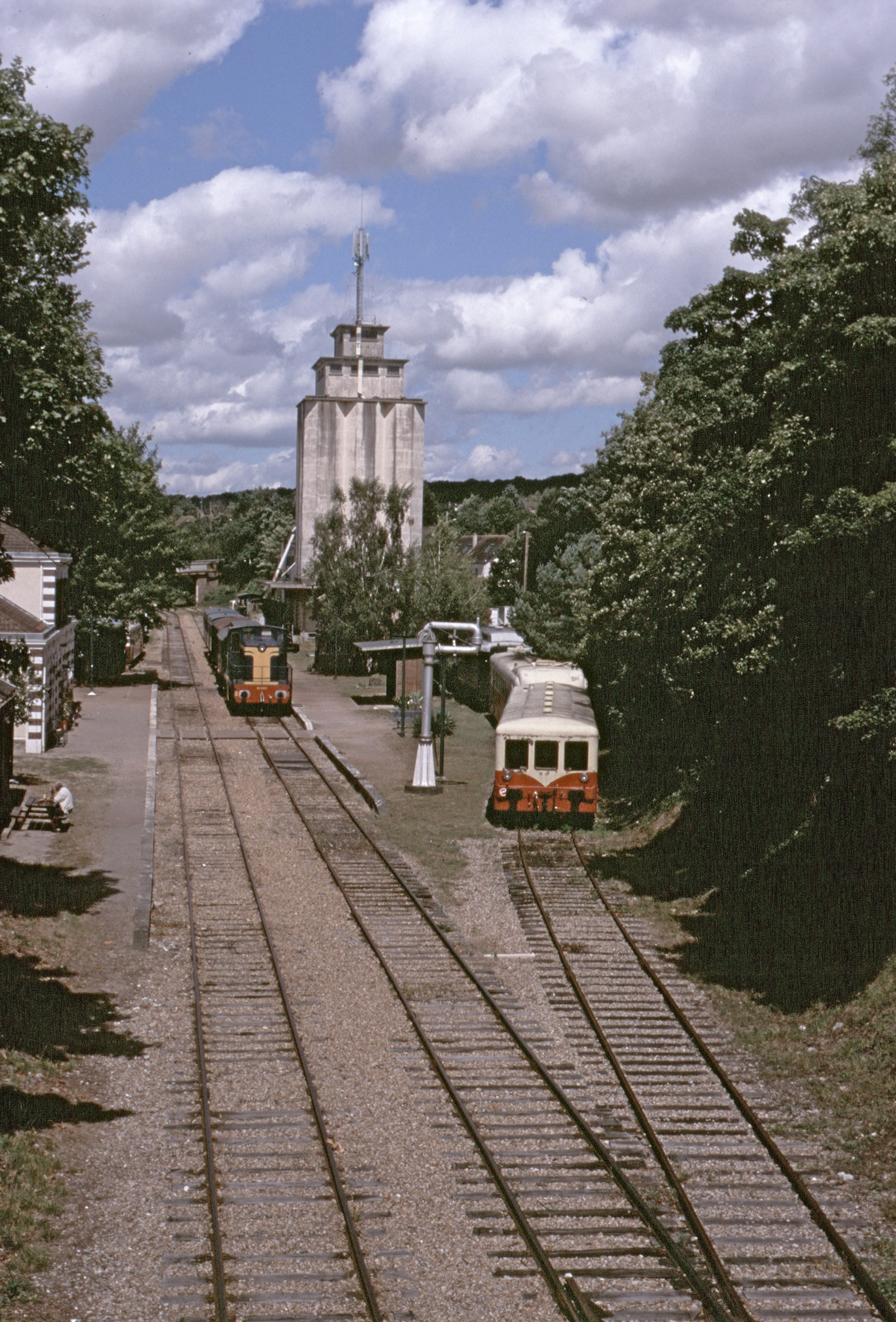 La gare de Pacy-sur-Eure